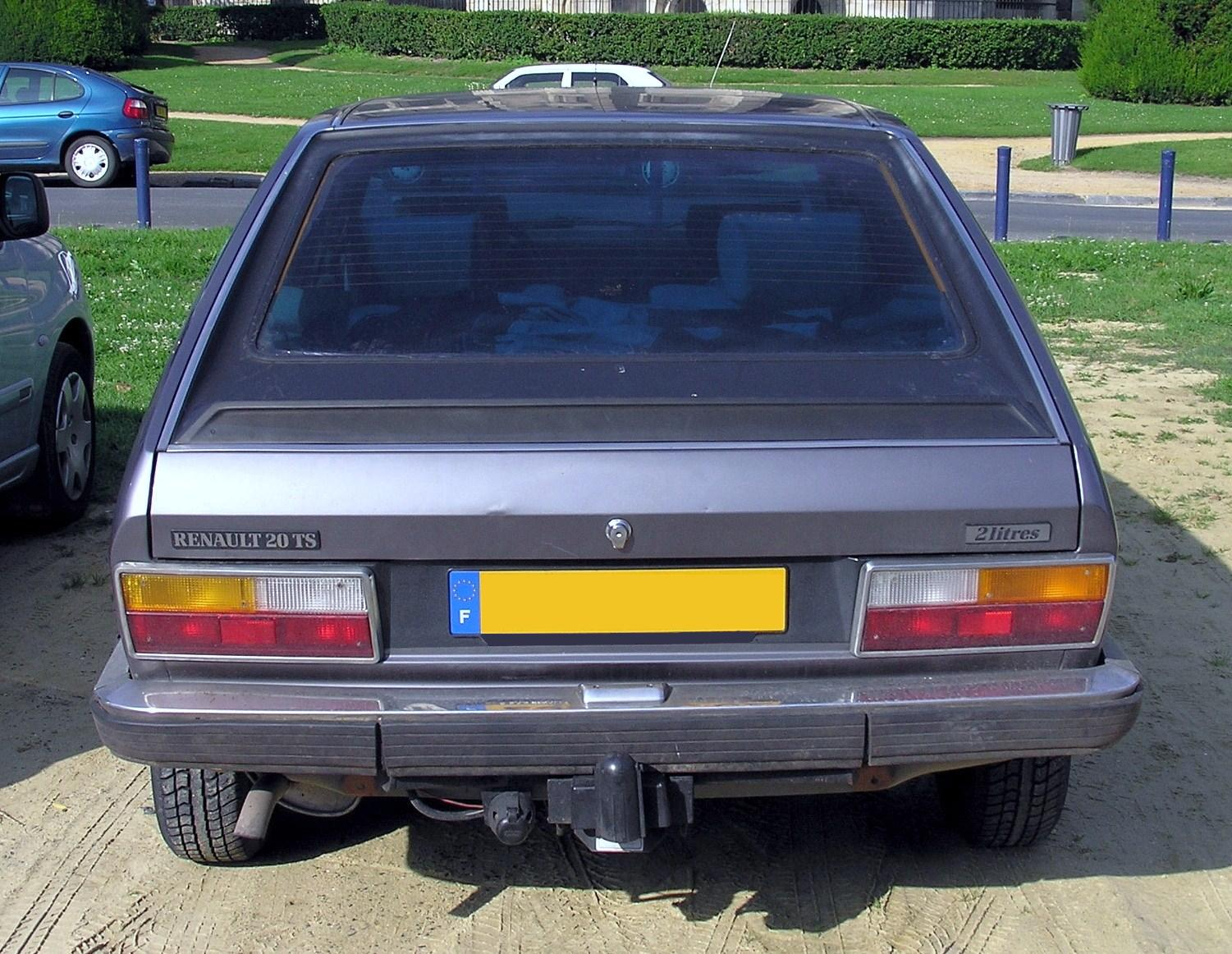 Renault 20 TS